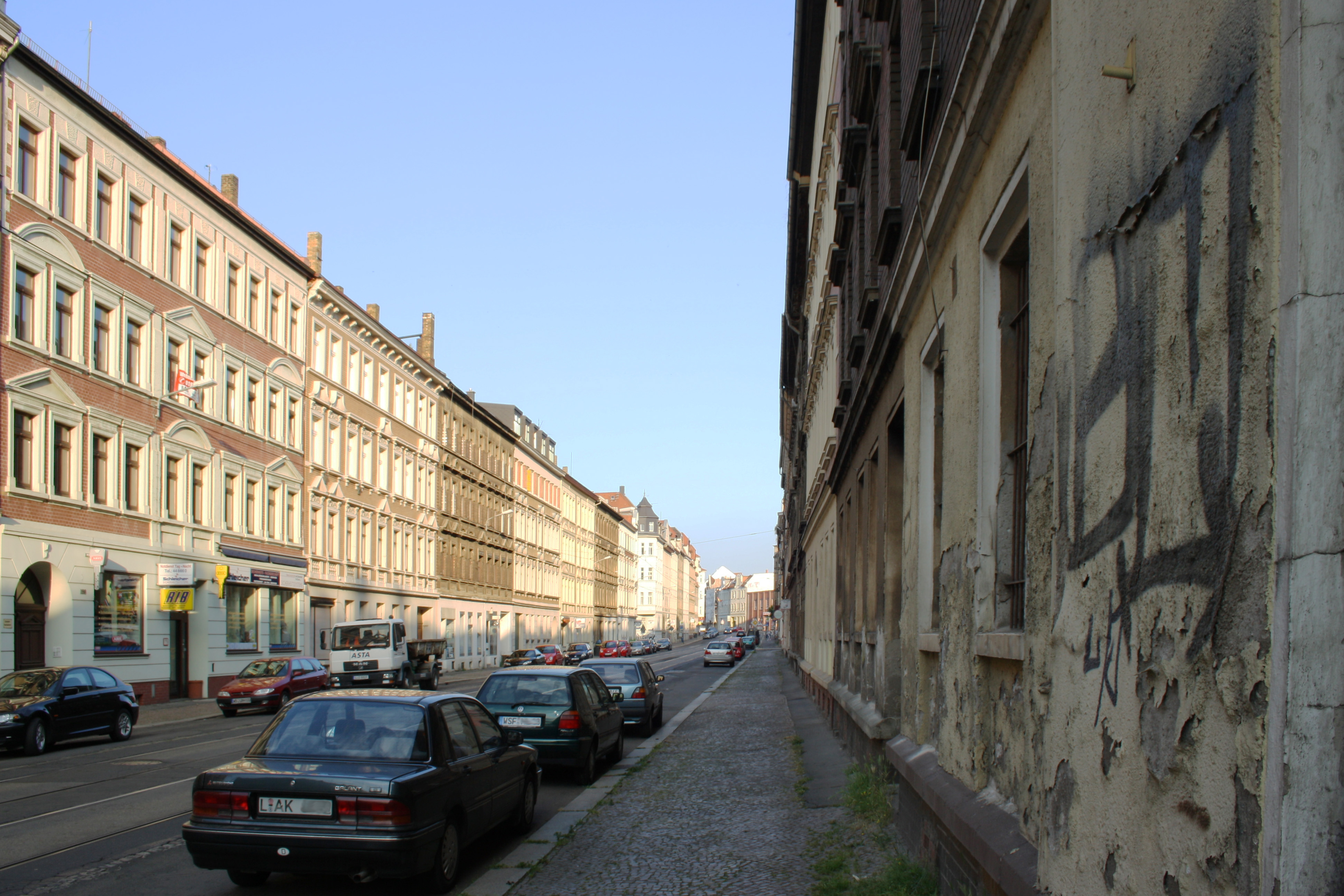 Straßenzug Georg Schwarz Straße, Leipzig